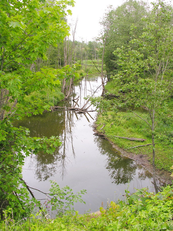 Trimėsėdis, upė, Virvytės kair. intakas Foto: Algirdas, 2006 m. liepos 18 d., Lietuva